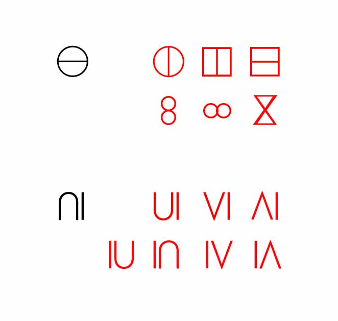 Wahrscheinliche Varianten von Zeichen der libysch-berberischen Inschriften auf der Insel El Hierro, nach Renata Ana Springer Bunk, Die libysch-berberischen Inschriften der Kanarischen Inseln in ihrem Felsbildkontext, Köln, 2014, S. 62